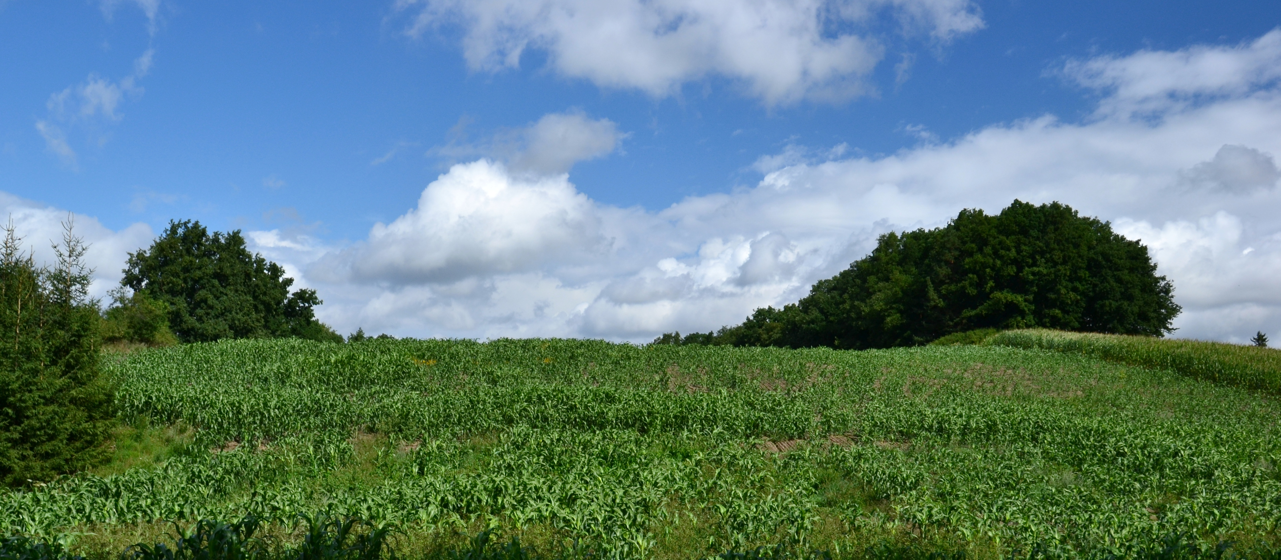 Hradiště Tuhošť u Smolova – pohled od jihu